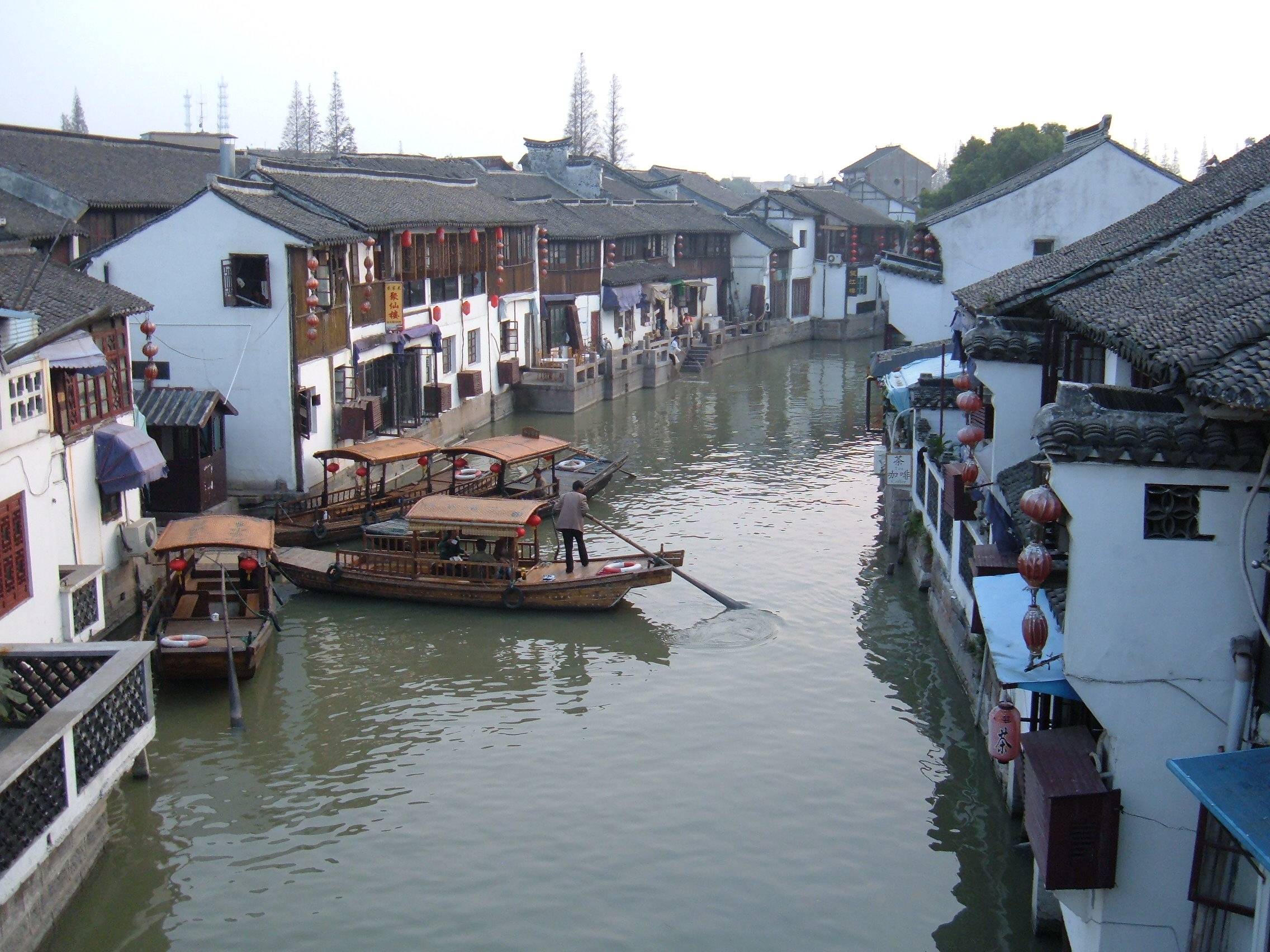 A canal in Zhujiajiao, PRC.